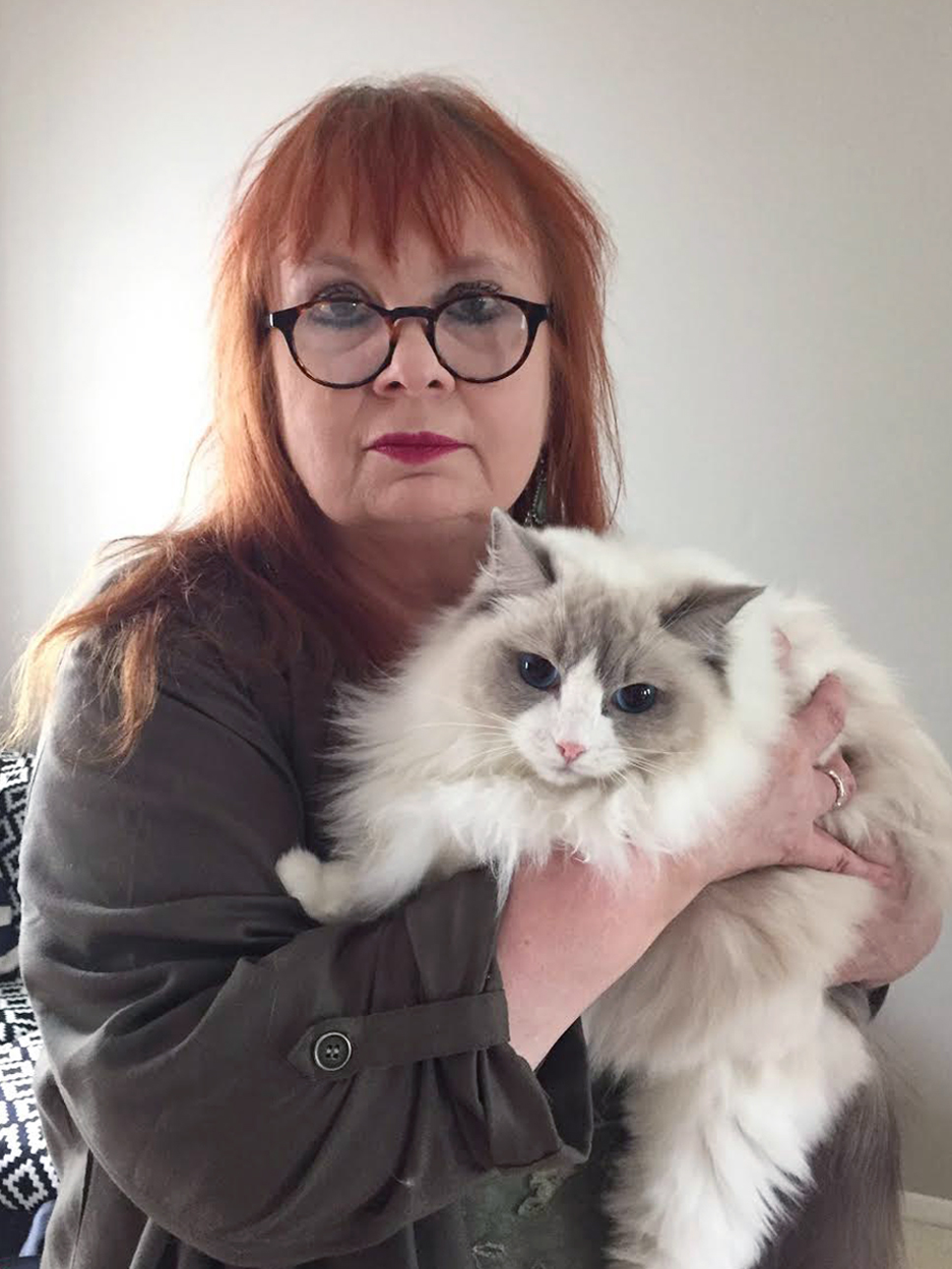 Pirjo Hämäläinen